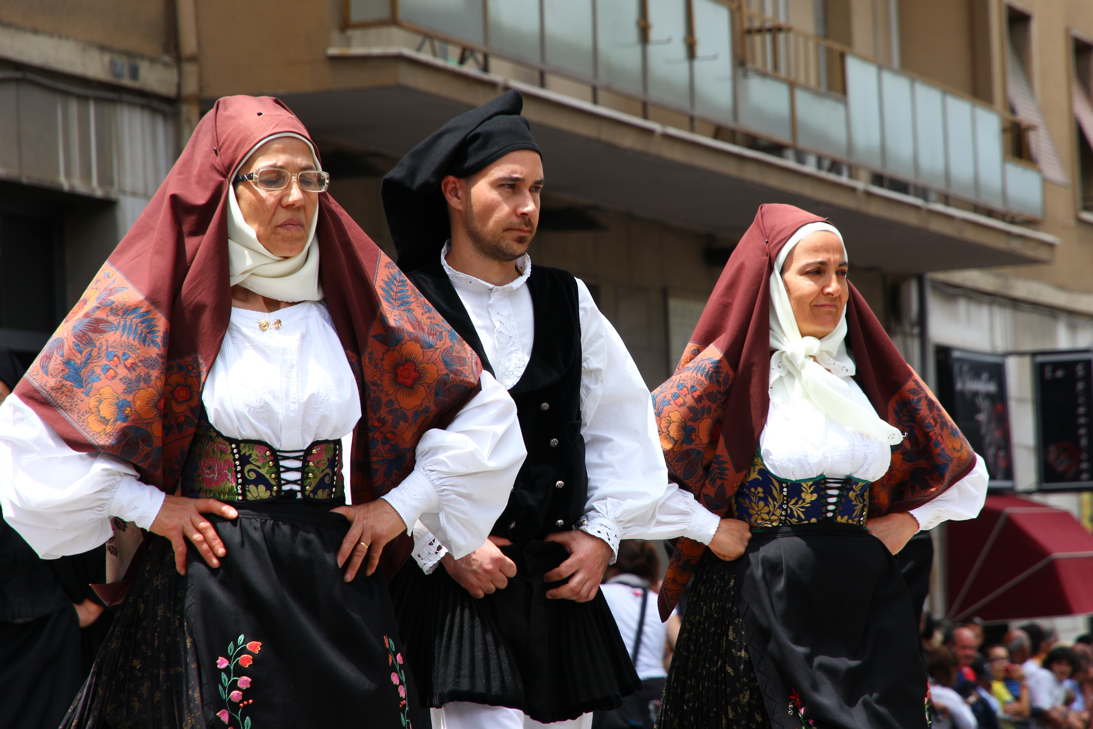 Cavalcata Sarda 2013 (Sassari)